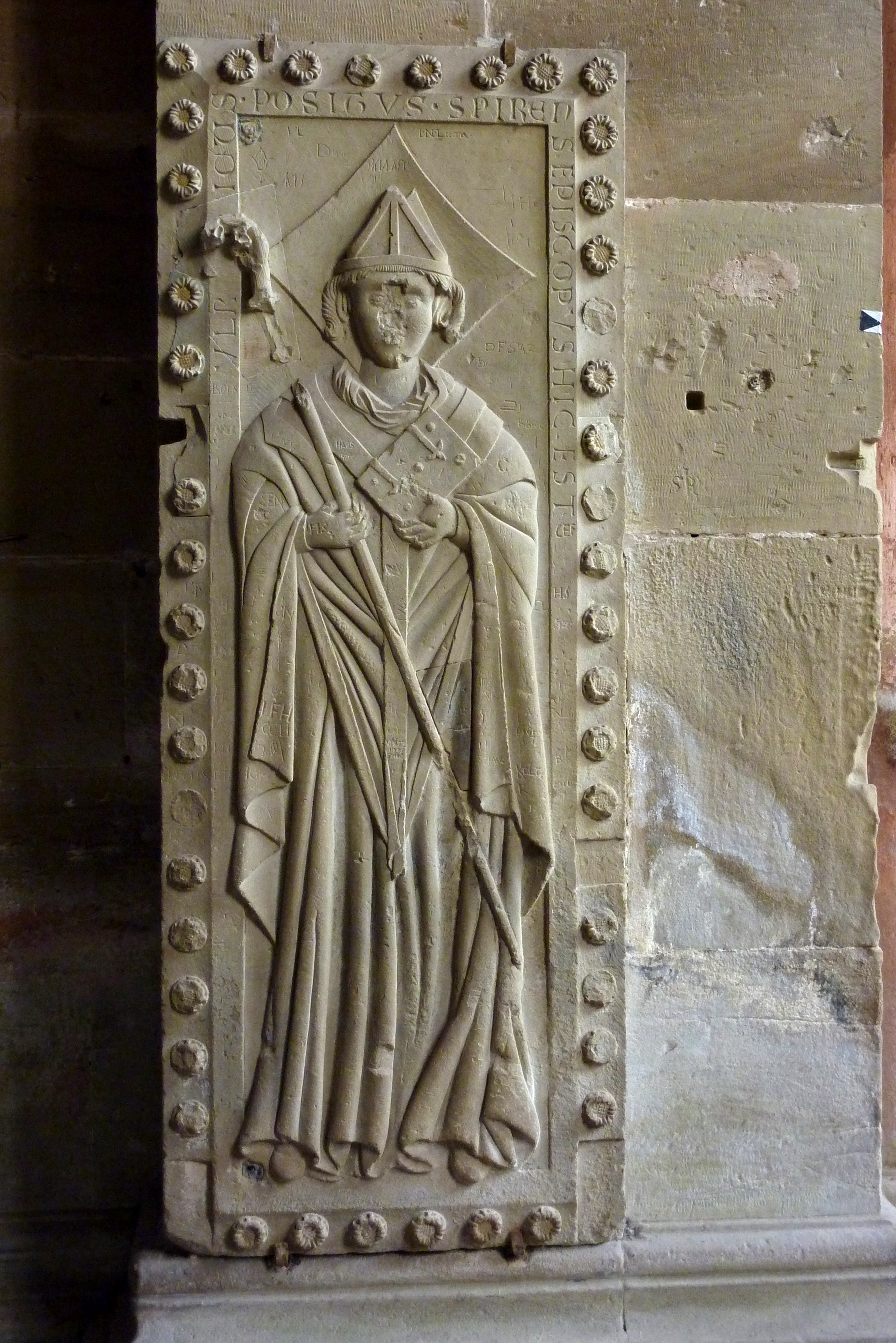 Grabplatte des Bischofs Ulrich I. von Dürrmenz in der Kirche des Klosters Maulbronn